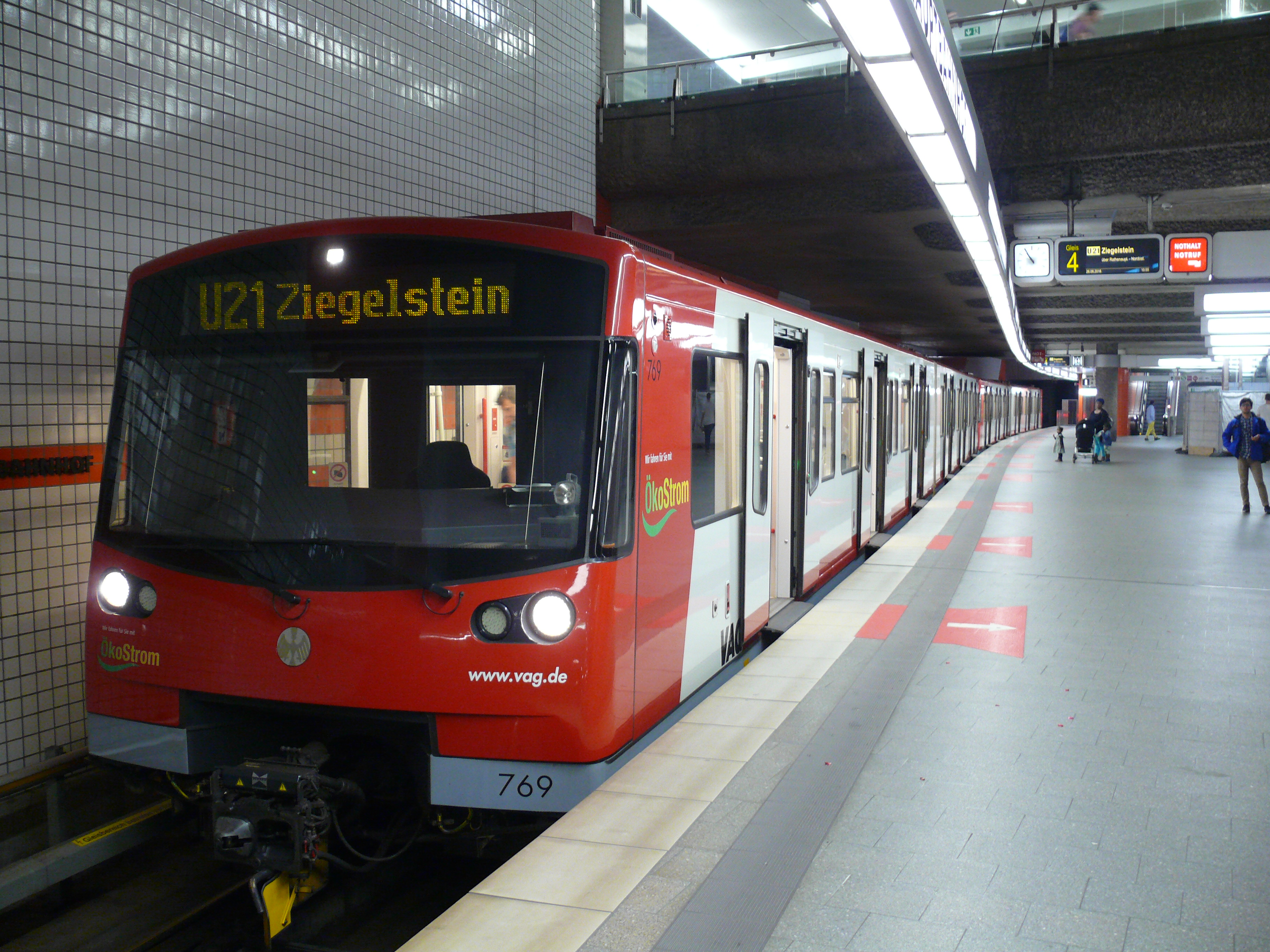 U-Bahnzug vom Typ DT3, auf der nicht mehr verkehrenden Linie U21, am U-Bahnhof Hauptbahnhof in Nürnberg.